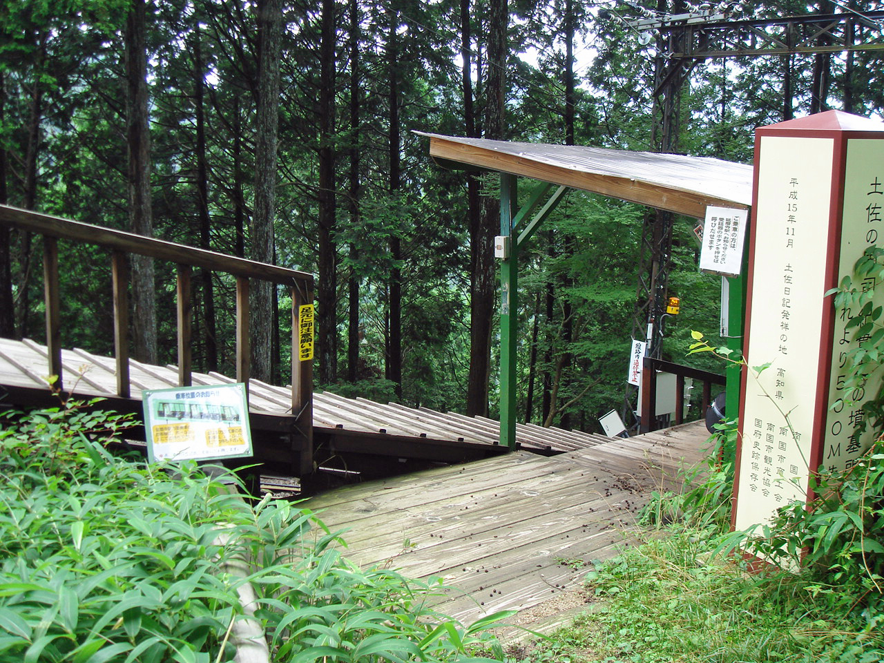 坂本ケーブルもたて山駅小屋